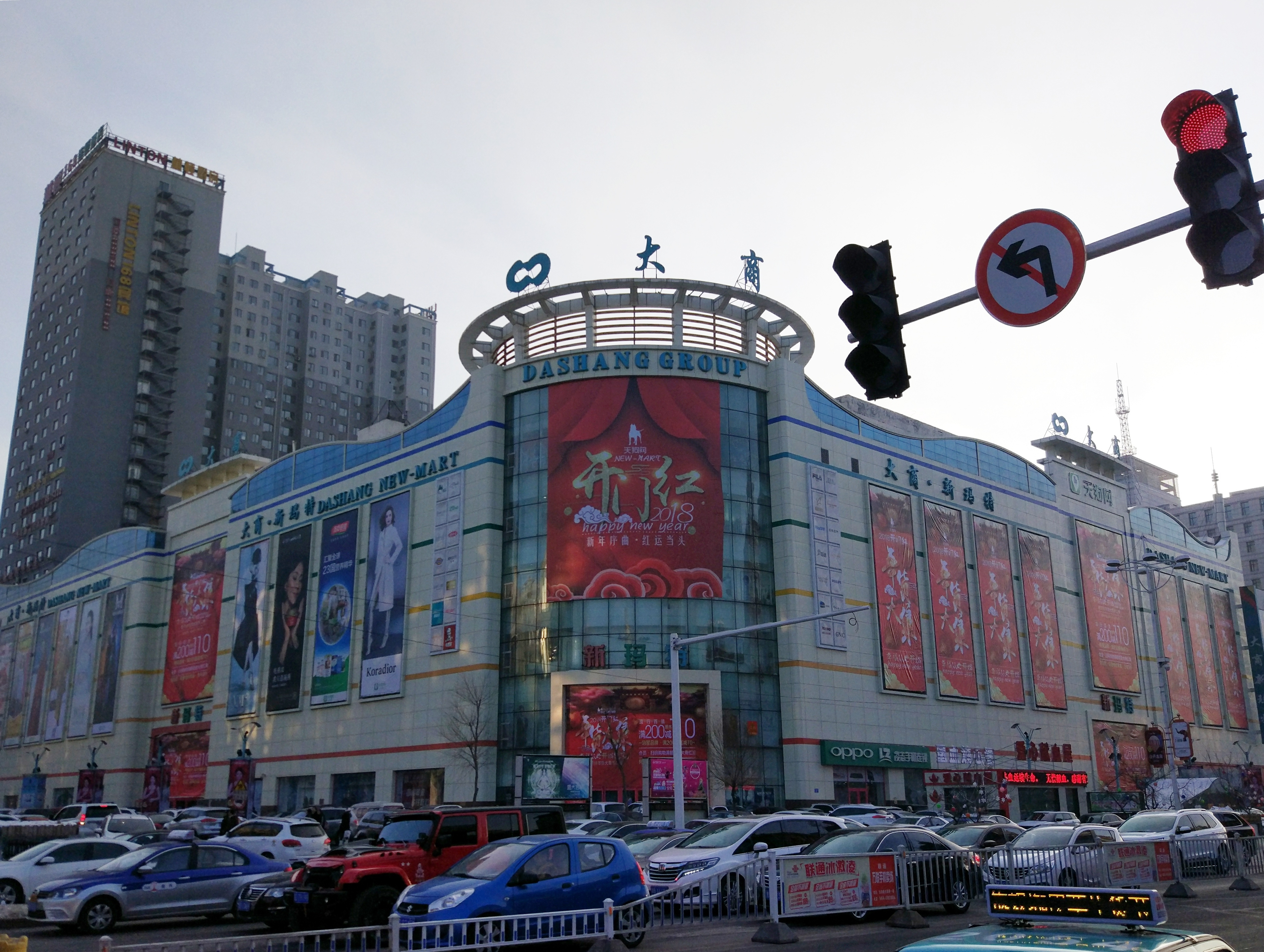 佳木斯新玛特，摄于2018年2月